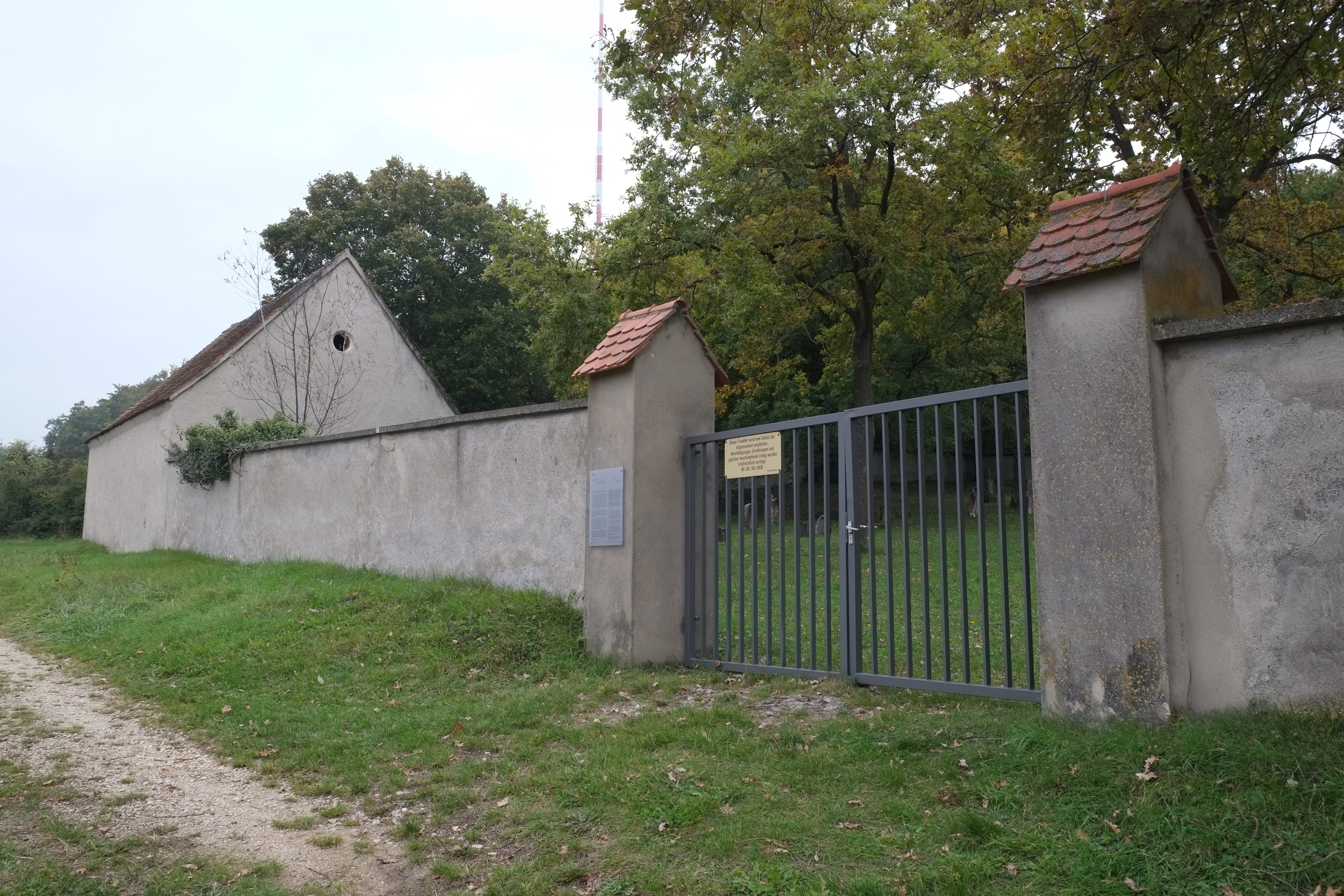 Jüdischer Friedhof in Harburg im Landkreis Donau-Ries (Bayern)